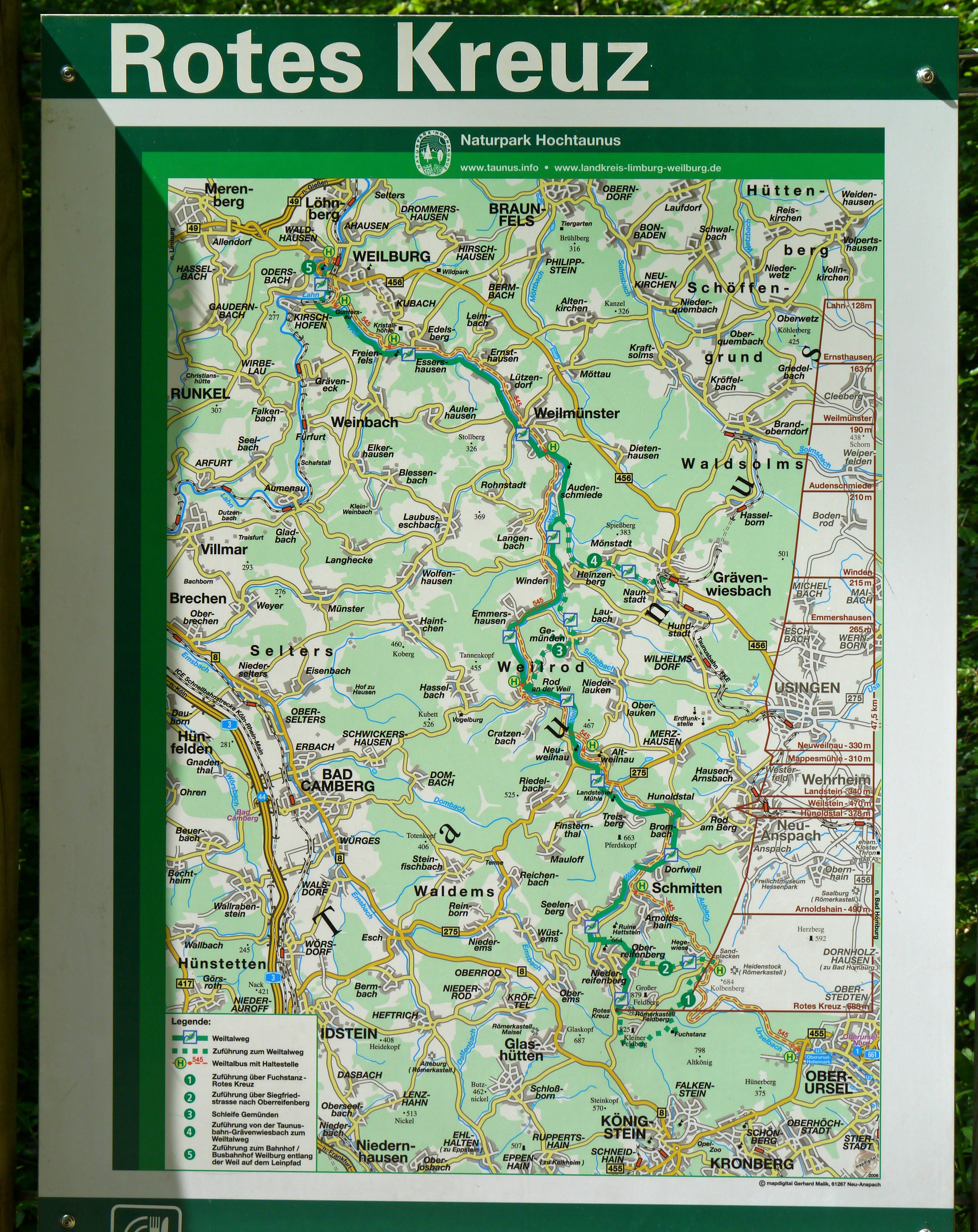 Landkarte des Hochtaunus zwischen Braunfels und Kronbeg, am Roten Kreuz. Mit Angabe des Weiltalwegs inkl. des Höhenprofiles.